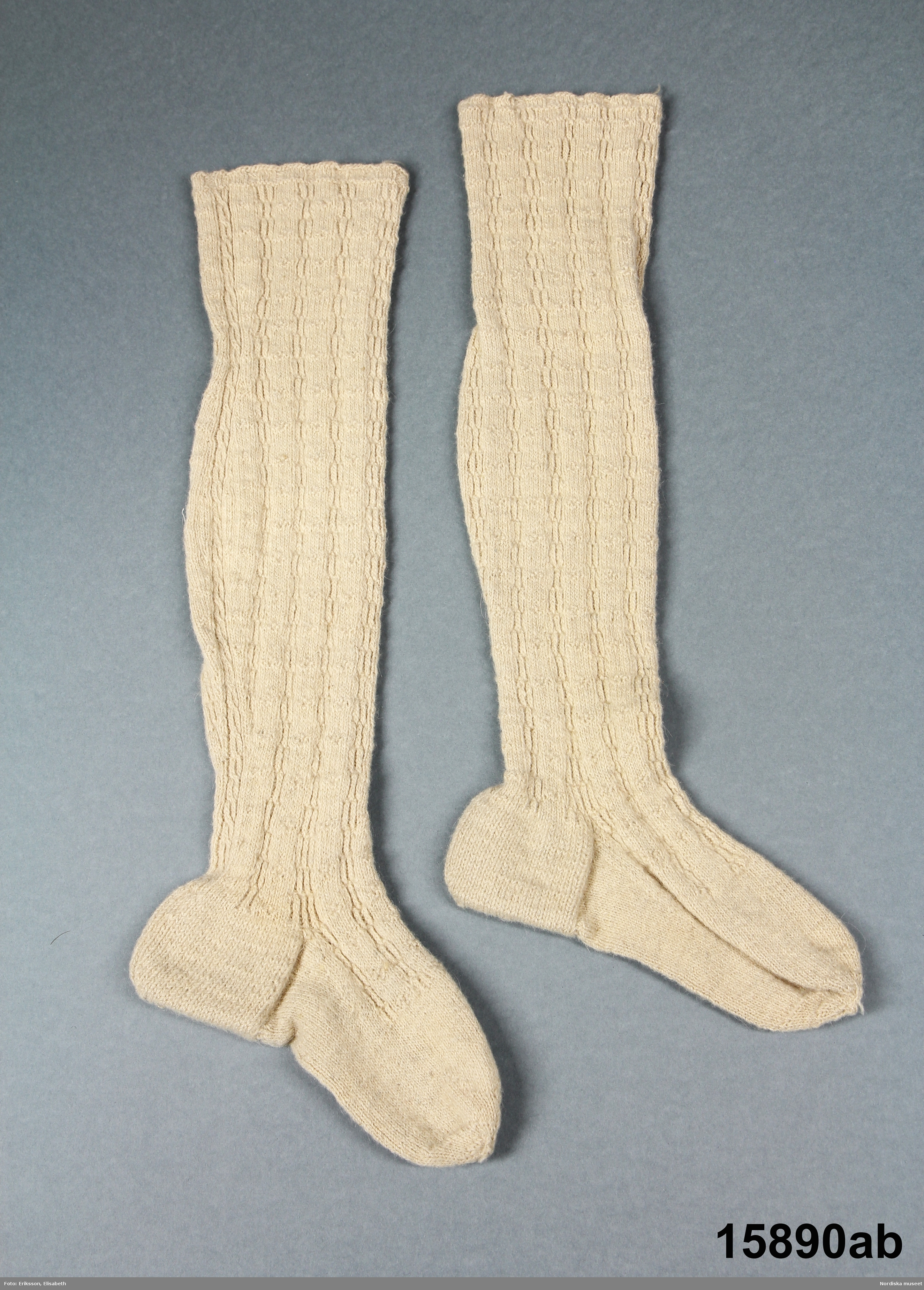 Strumpor